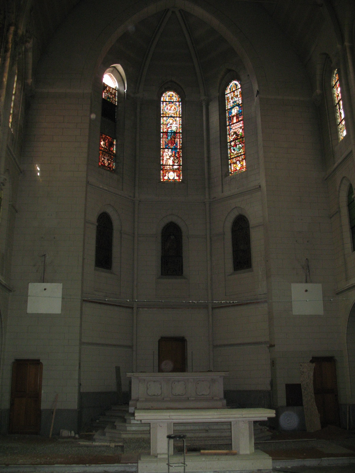 Antwerpen, Lange Kongostraat. Kapel Franciscanessenklooster binnenzicht op altaar.